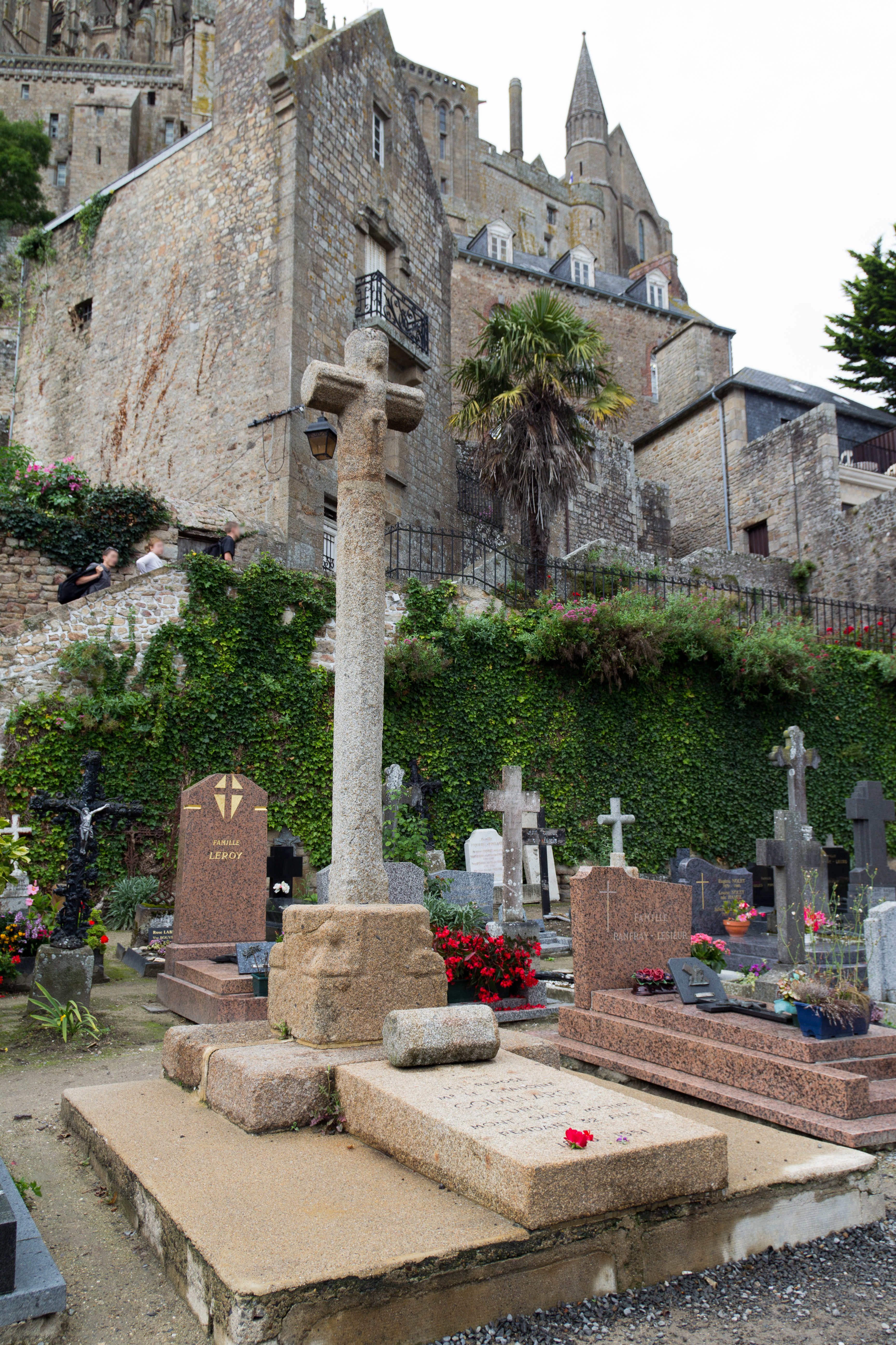 Tombeau et croix du chanoine Couillard. .